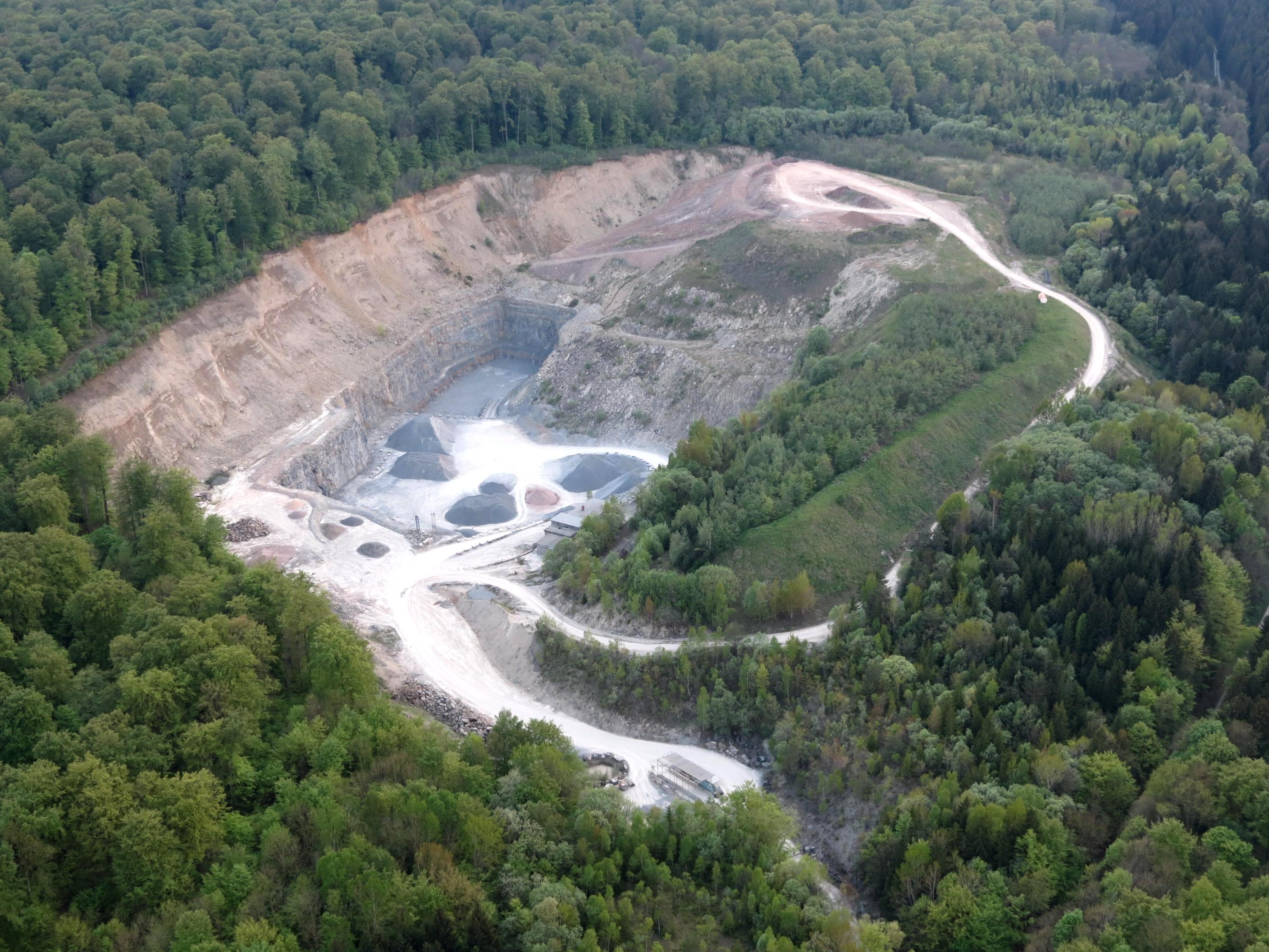 Kalksteinbruch im Senkig im nördlichen Hainich (nordöstlich von Heyerode im oberen Seebachgrund und am nordosthang des Semmberges).